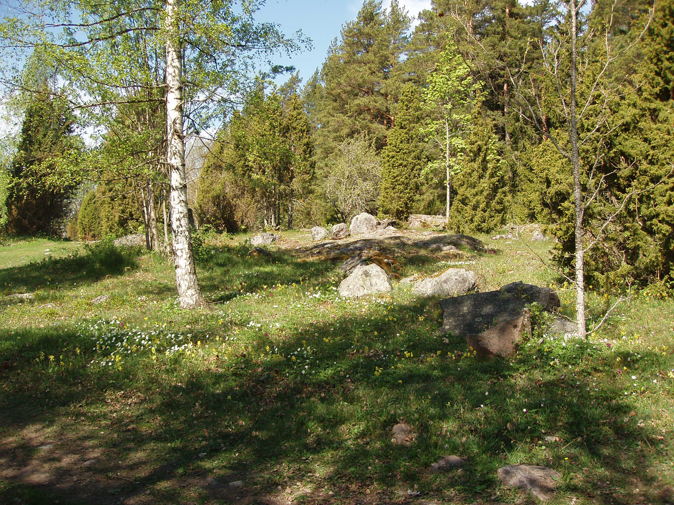 Ljusterö, Bössarviken. May 2008. Rare flowers, Adam & Eva.